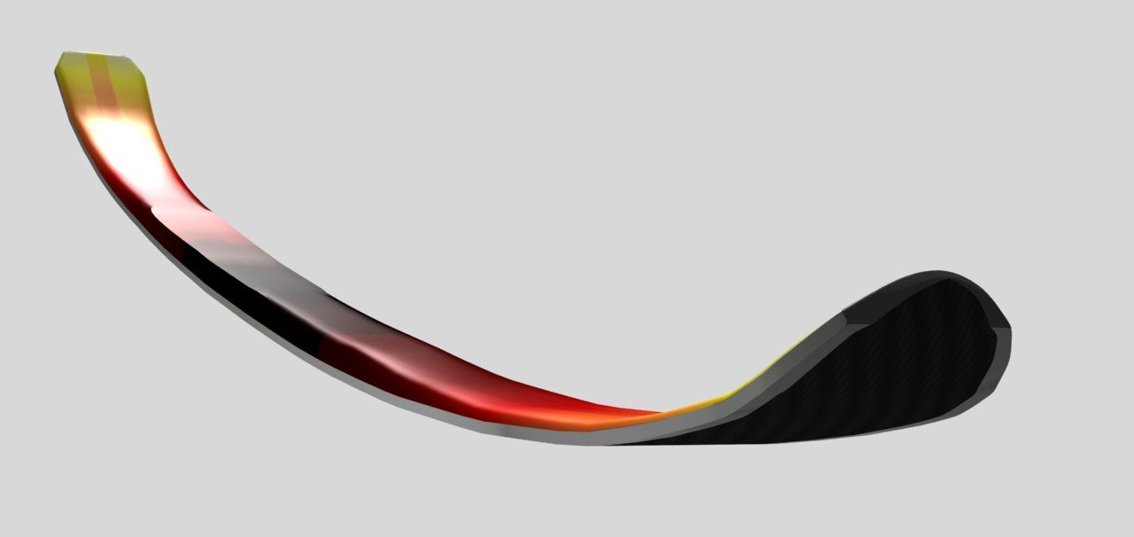 Demonstration of ski flex